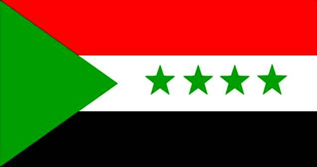 Drapeau du Mouvement populaire pour le salut de l'Azawad (MPSA)